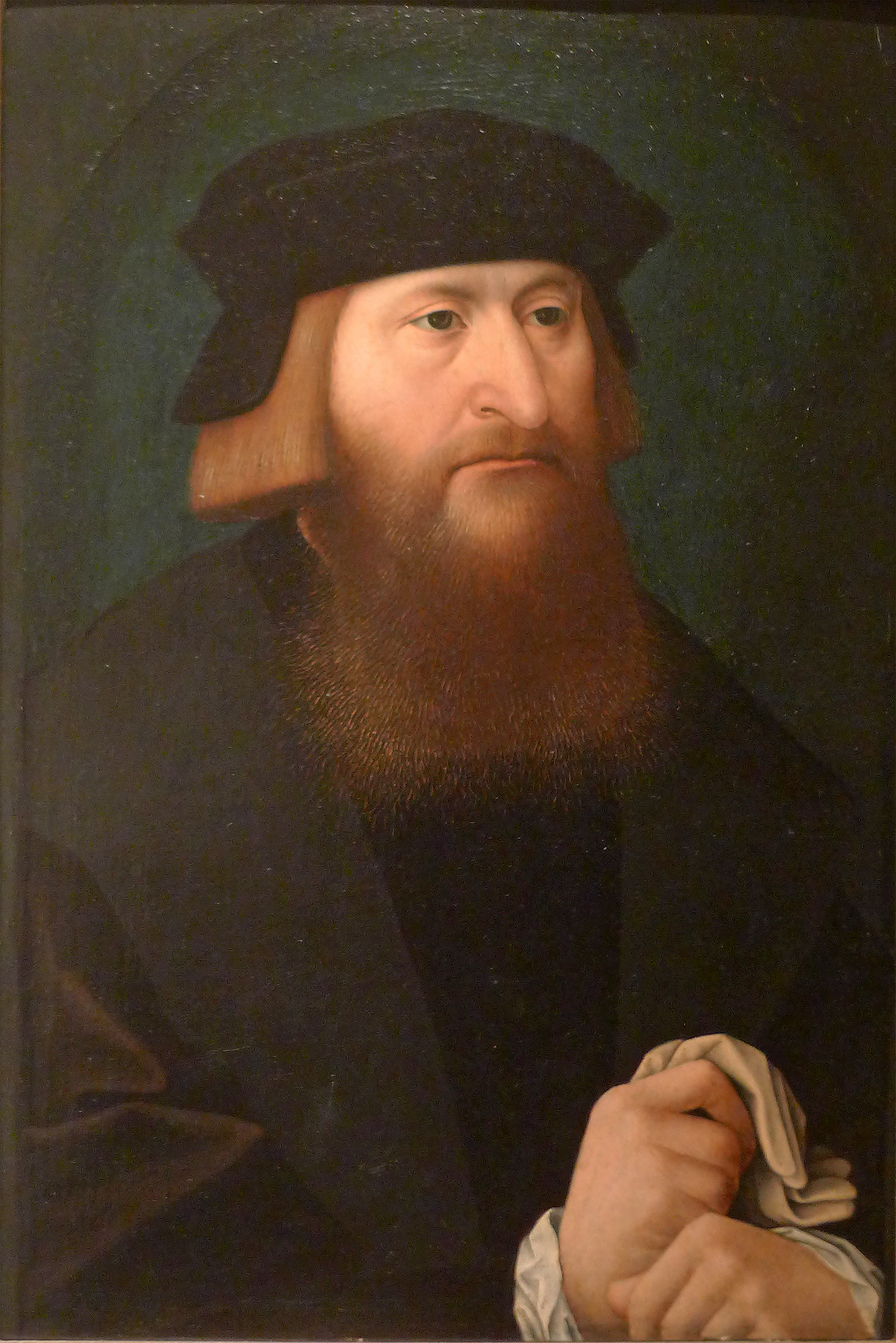 "Portrait d'Andrea Alciati" (ou Alciat, Alcieto) par Ambrosius Benson Huile sur bois, première moitié du XVIe siècle Musée des Beaux-Arts d'Angers (inv. : 003.1.424) Collection Duclos, don de sa veuve en 2002.